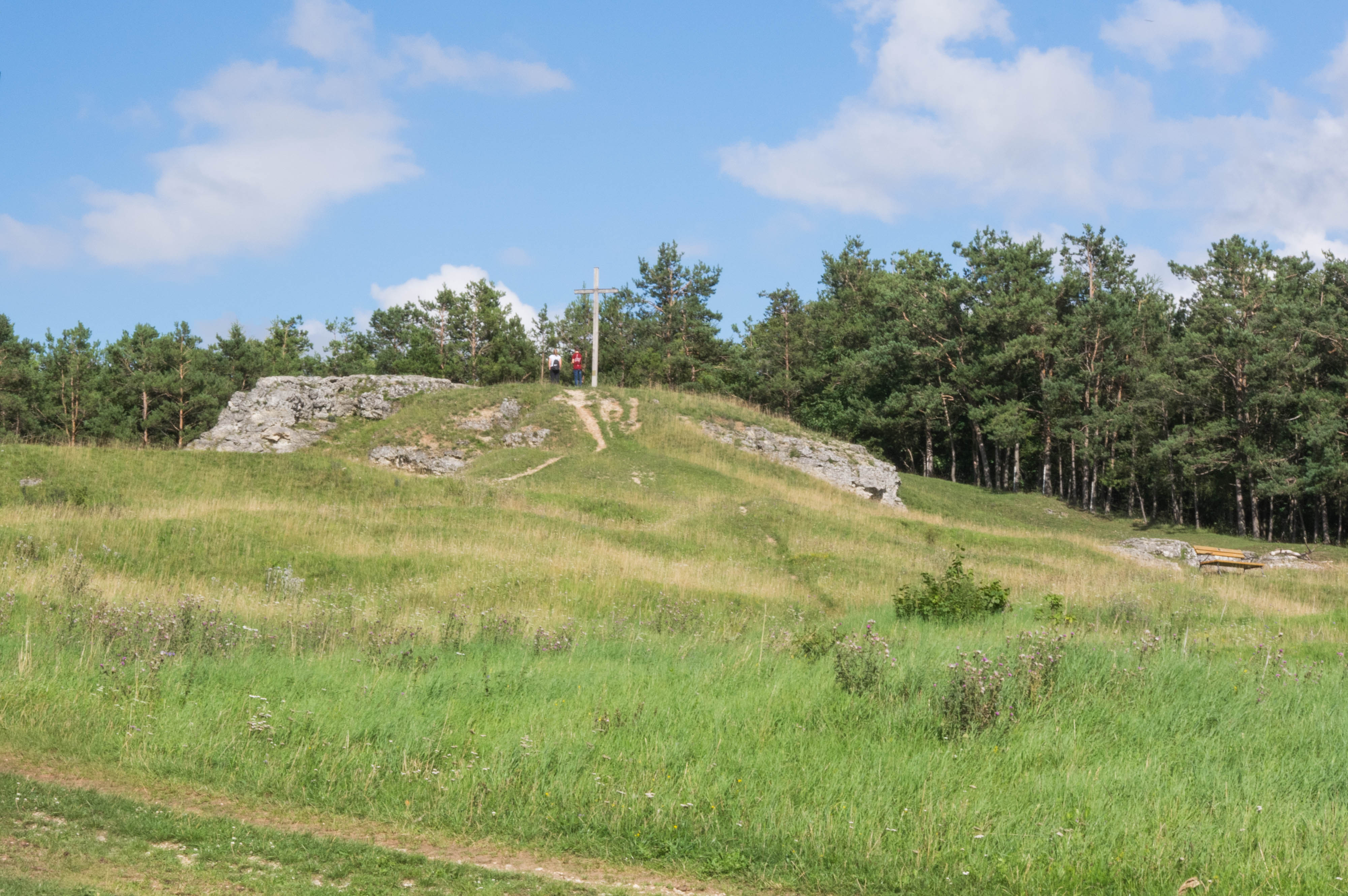 von Westen: Auswurfmassiv aus dem Ries-Impakt auf dem Adlersberg; Naturdenkmal, Geotop, Landschaftssschutzgebiet, Bodendenkmal